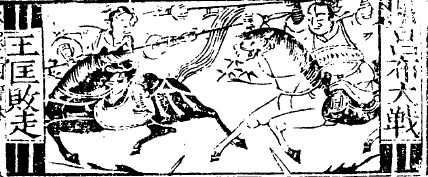 《三國志傳評林》對於「王匡受呂布追殺而逃亡」的想像圖